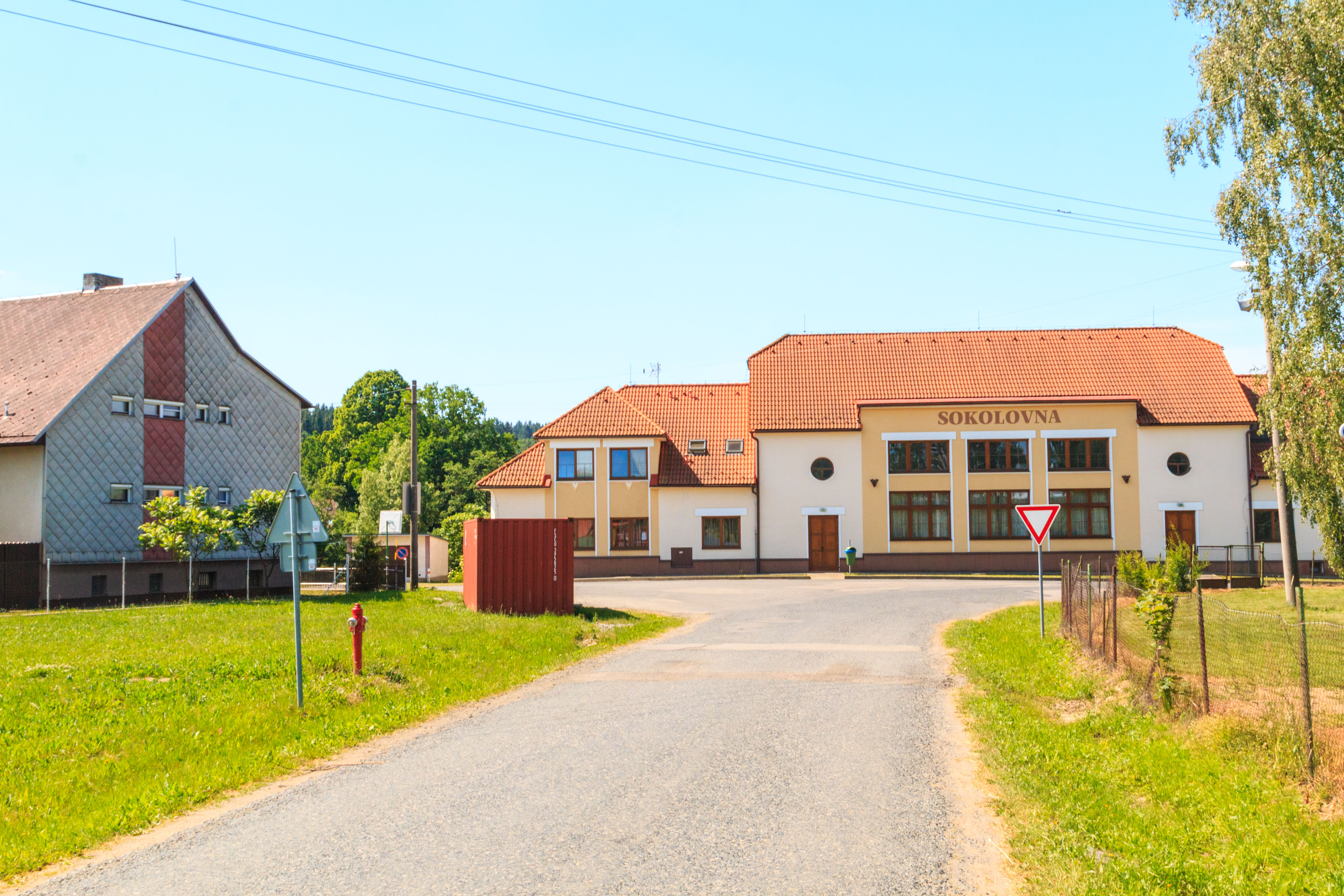 Dolní Jedlová - čp. 08 Project: Vodstvo.